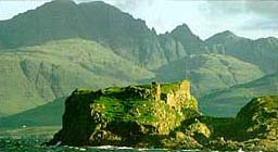 מבט צדדי על טירת דונסקה